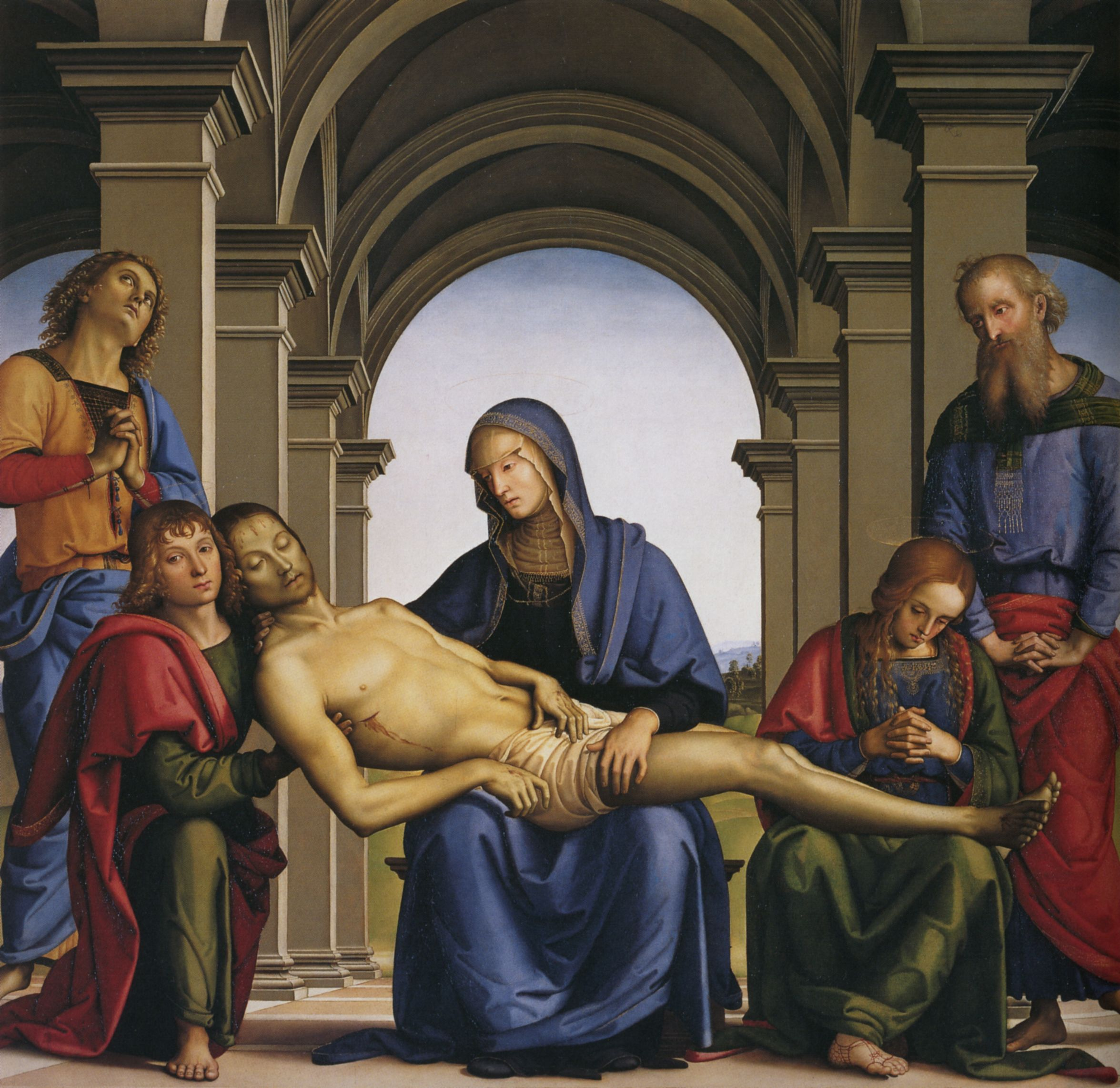 Pietro Perugino: Pietà con i Santi Giovanni Evangelista, Maria Maddalena, Nicodemo e Giuseppe d’Arimatea. Cat. no. 19 in Vittoria Garibaldi: Perugino. Catalogo completo. Octavo, Firenze 2000, ISBN 88-8030-091-1